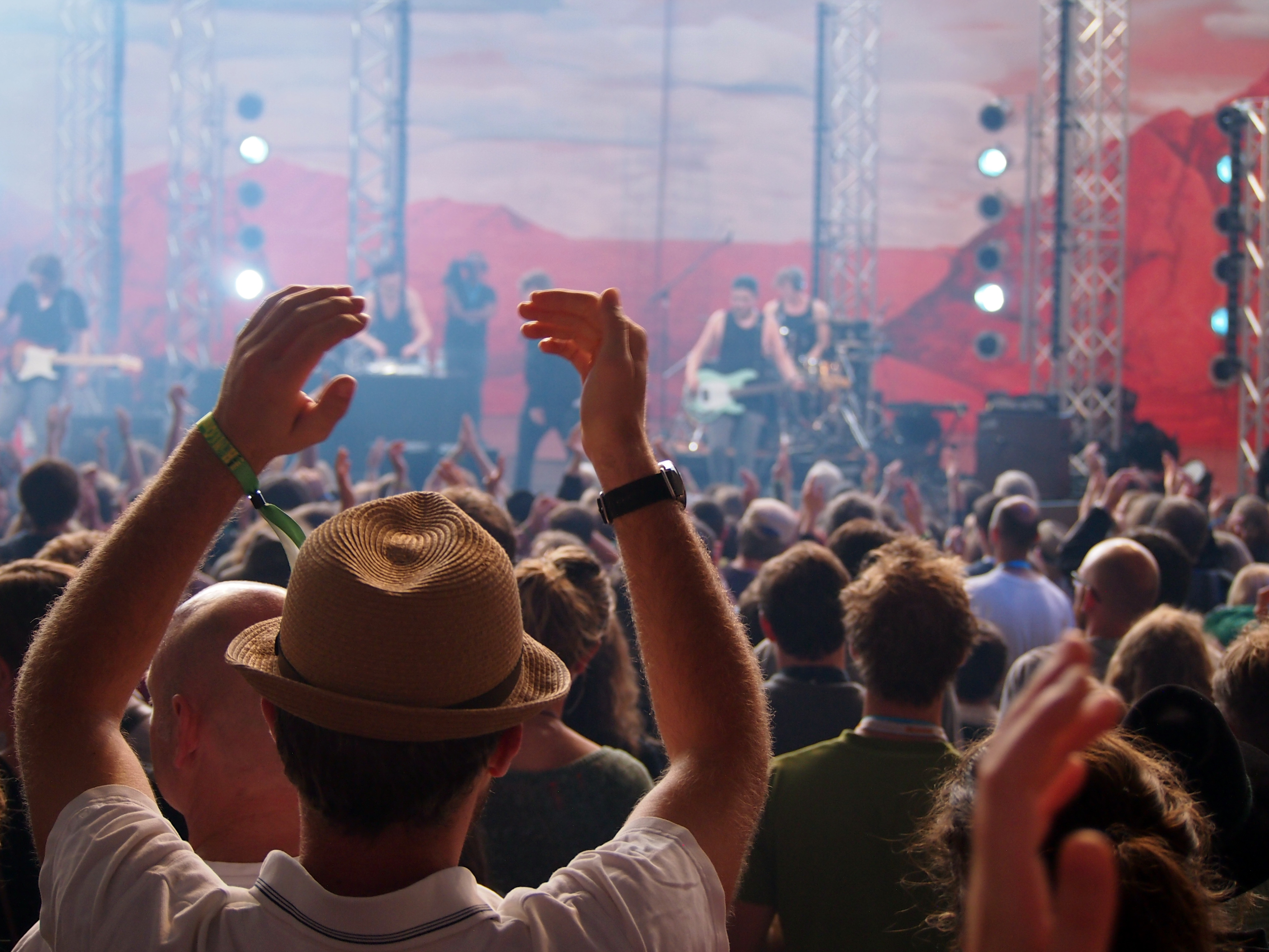 Heimatsound-Festival 2014, Publikum. Auf der Bühne: Exclusive Festivalsommer This photo was created with the support of donations to Wikimedia Deutschland in the context of the CPB project "Festival Summer". This file is made available under the Creative Commons CC0 1.0 Universal Public Domain Dedication. The person who associated a work with this deed has dedicated the work to the public domain by waiving all of their rights to the work worldwide under copyright law, including all related and neighboring rights, to the extent allowed by law. You can copy, modify, distribute and perform the work, even for commercial purposes, all without asking permission. Personality rights warningAlthough this work is freely licensed or in the public domain, the person(s) shown may have rights that legally restrict certain re-uses unless those depicted consent to such uses. In these cases, a model release or other evidence of consent could protect you from infringement claims.